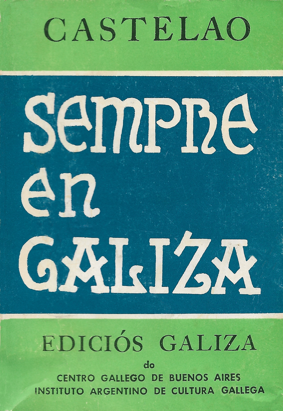 Portada da cuarta edición de 'Sempre en Galiza' de Castelao (Ediciós Galiza, 1974)